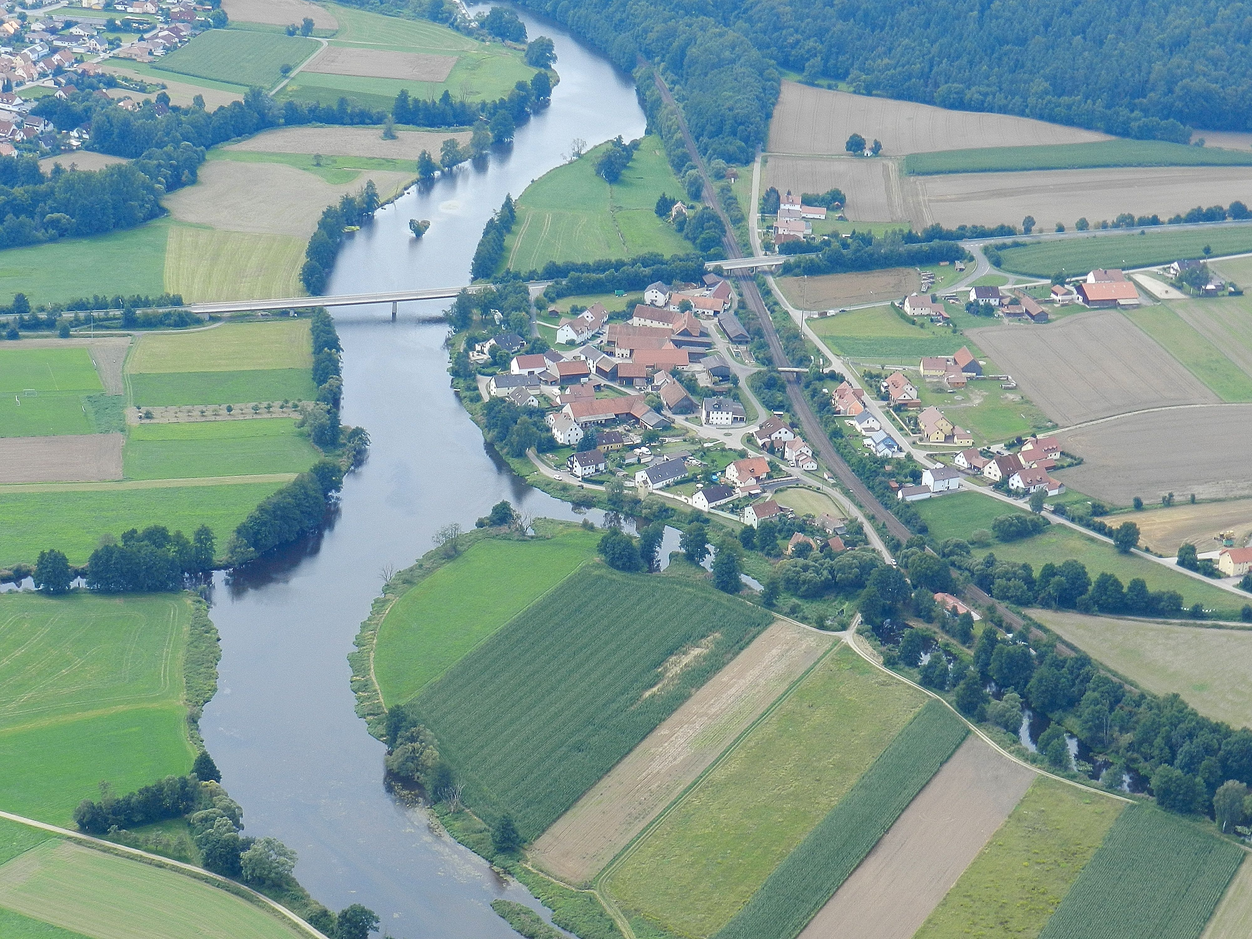 Iffelsdorf, Stadt Pfreimd, Landkreis Schwandorf, Oberpfalz, Bayern (14. August 2011); Iffelsdorf mit Fluss Naab; Am linken Bildrand sieht man die Einmündung des Flusses Pfreimd in die Naab.